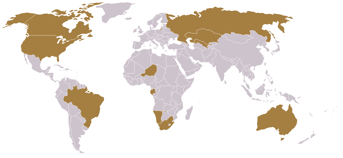 Países produtores de minérios de urânio em 2007